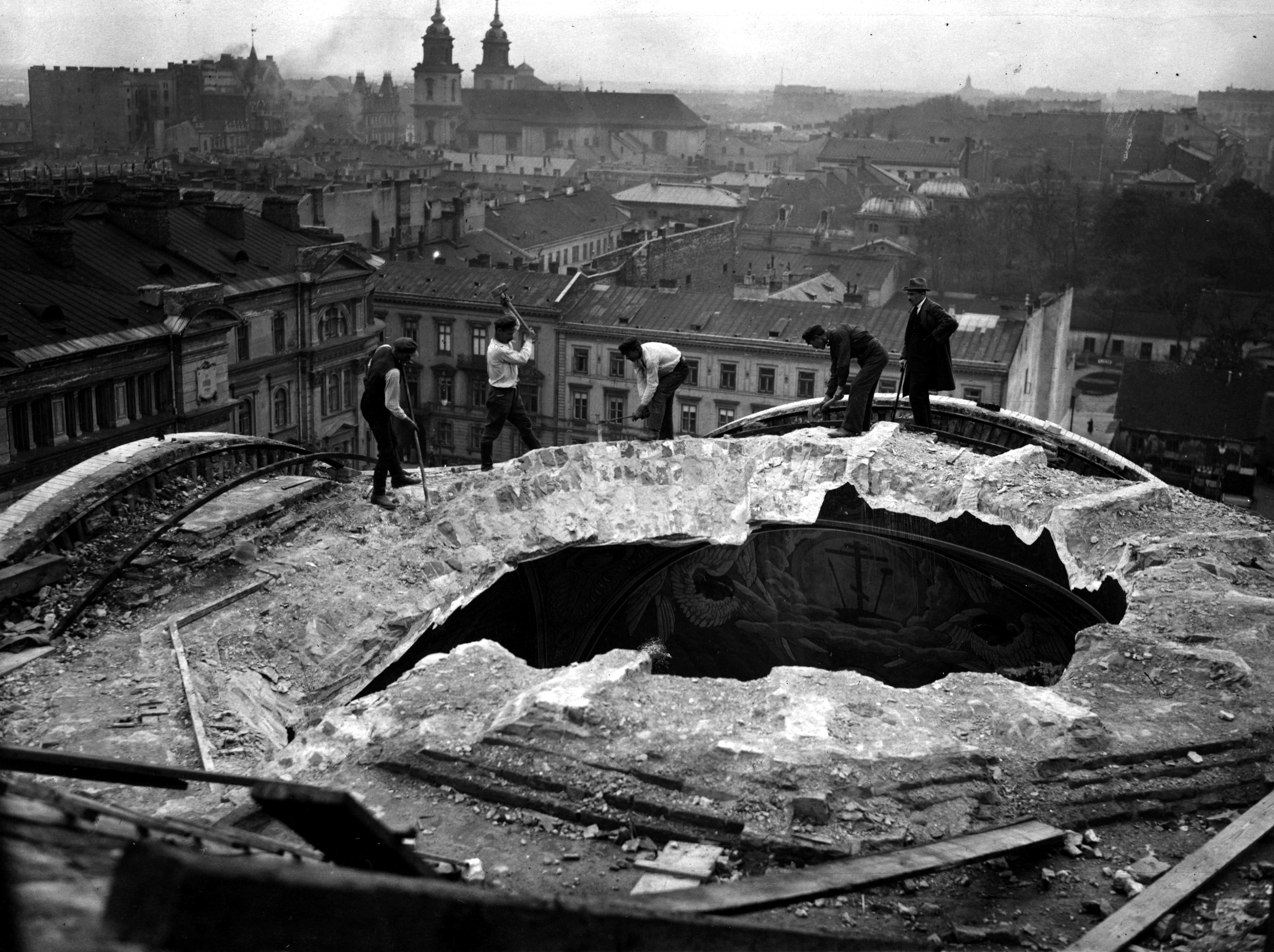 Widok burzenia soboru na placu Saskim. W tle pałac Bruhla i fragment pałacu Saskiego